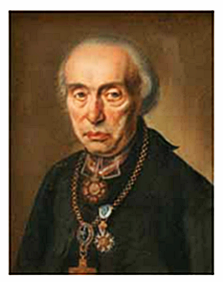 Der Speyerer Bischof Matthäus Georg von Chandelle (1745-1826), Pastellbild, gemalt von seinem Bruder Andreas Joseph Chandelle (1743–1820)